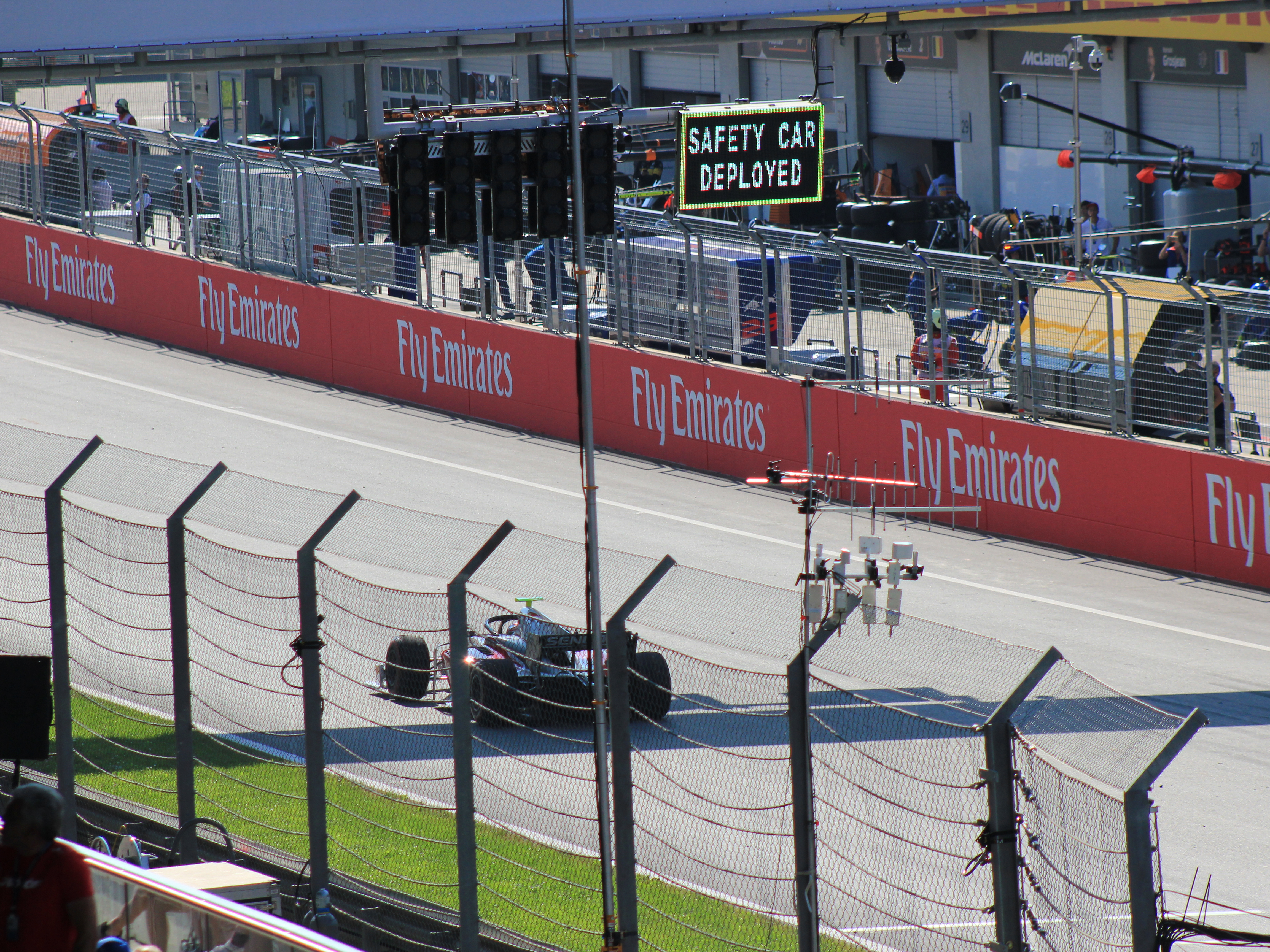 Safety-Car rückt aus